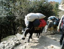 Dzo w Nepalu.